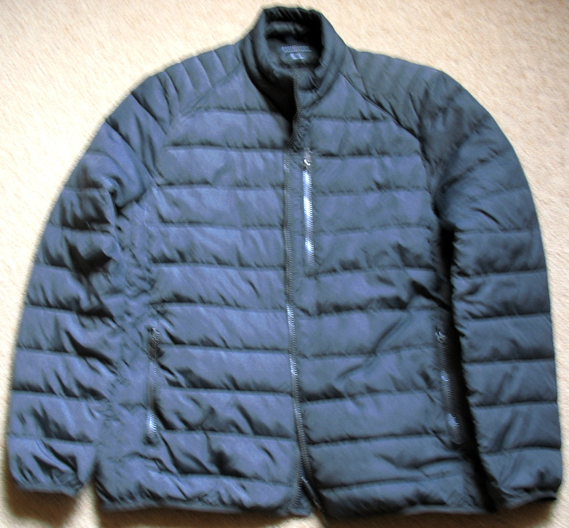 Hydrophobes Gewebe